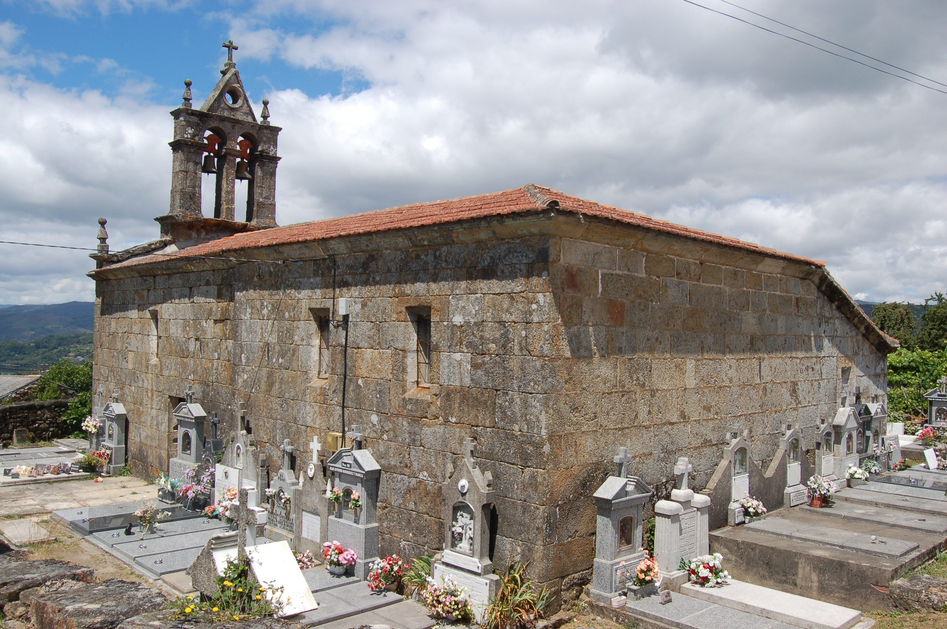 Igrexa parroquial de Santa María de Cados (Muíños)